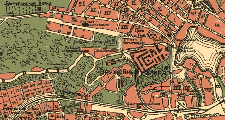 Карта Сесторецка начала ХХ века